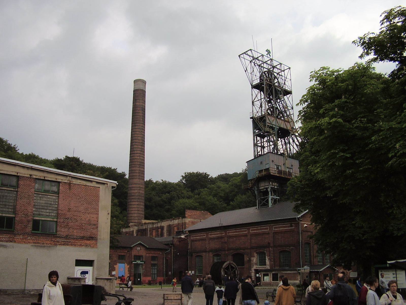 Hornické muzeum OKD, Ostrava, městský obvod Petřkovice